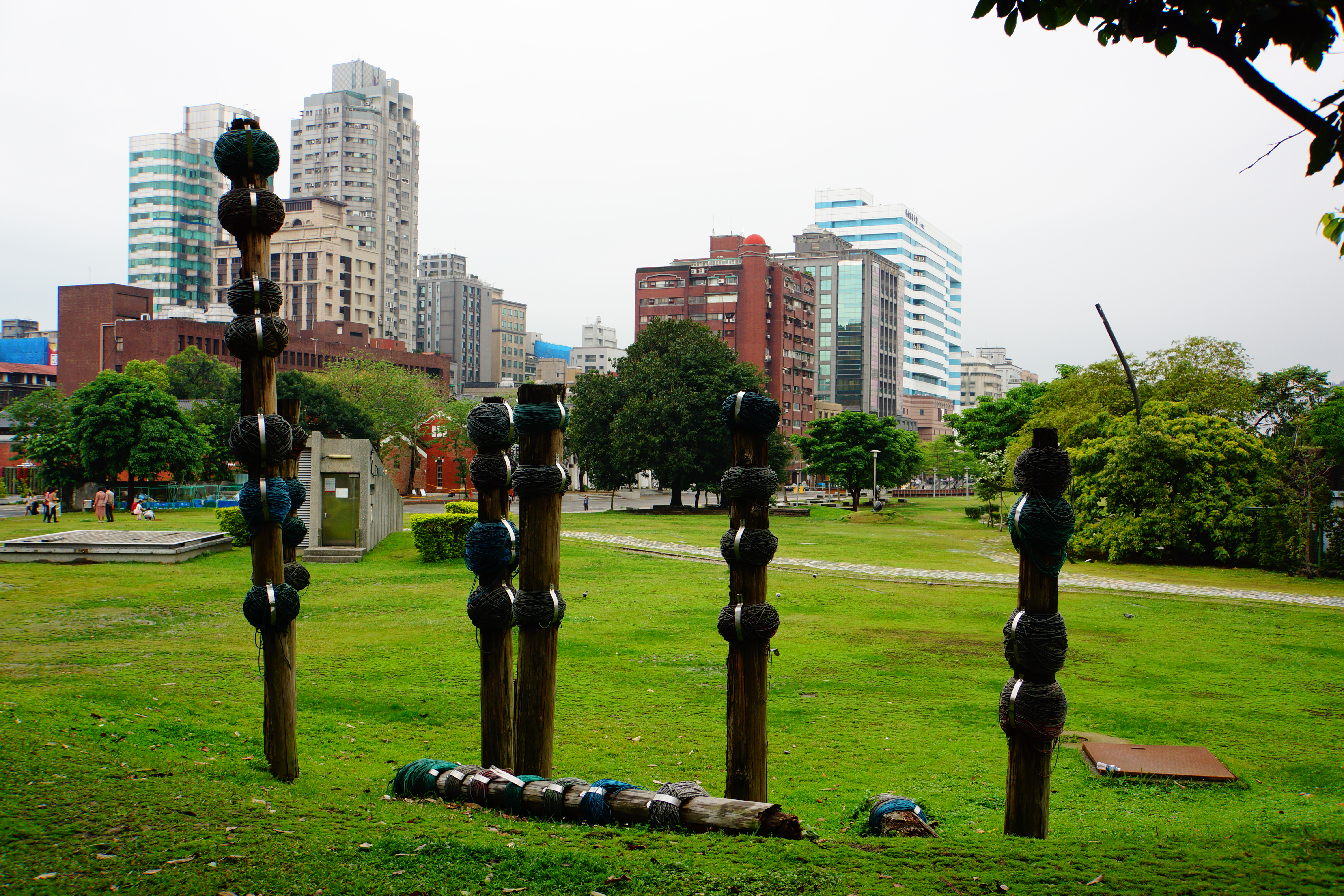 中文（台灣）: 華山1914文化創意產業園區草原裝置藝術。